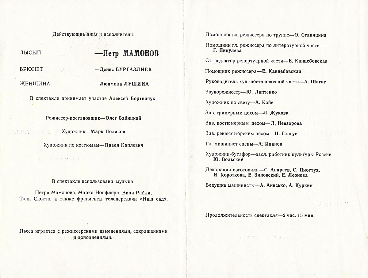 Програмка первого спектакля Петра мамонова "Лысый брюнет" (внутри)